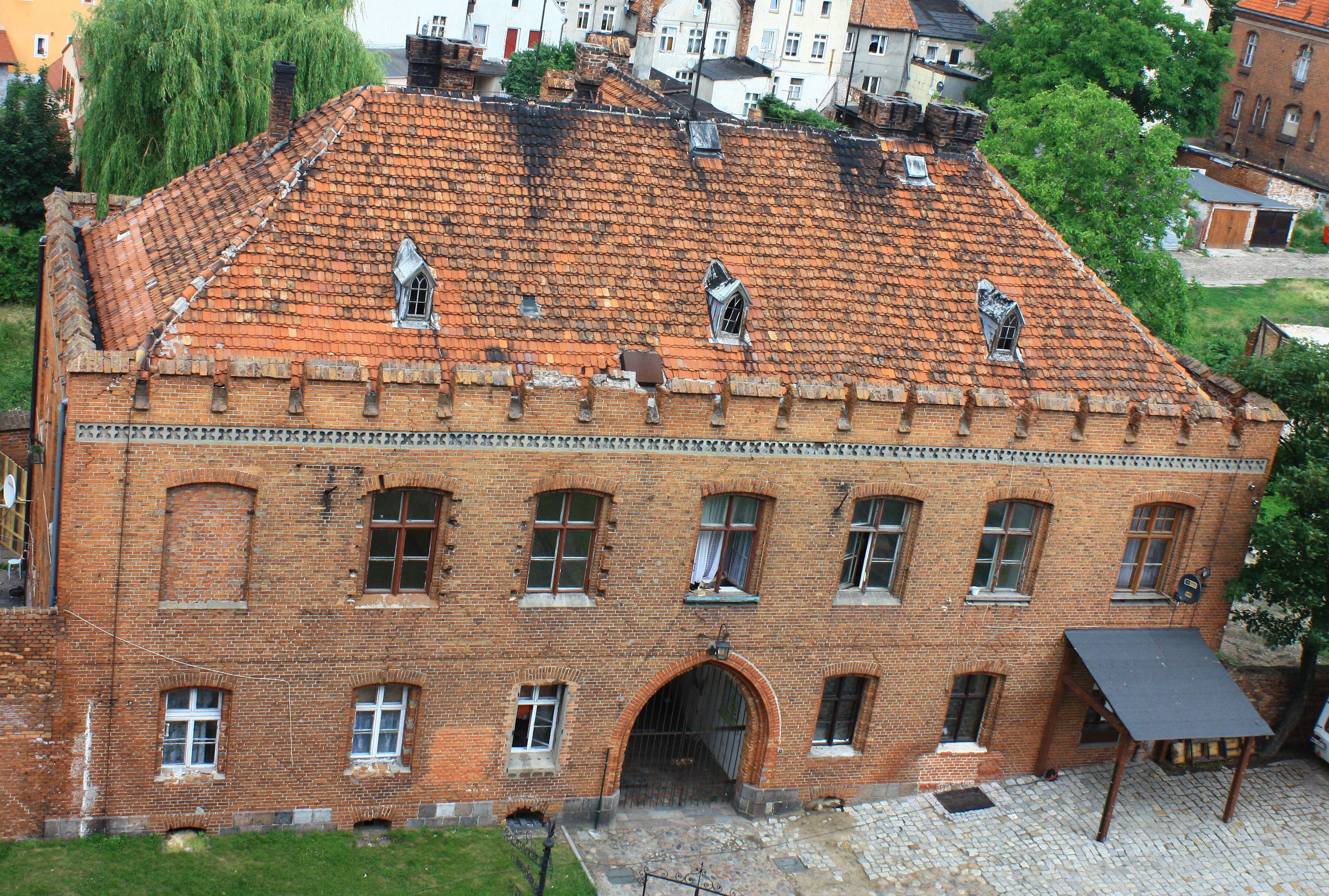 Gniew, budynek bramny, 1855